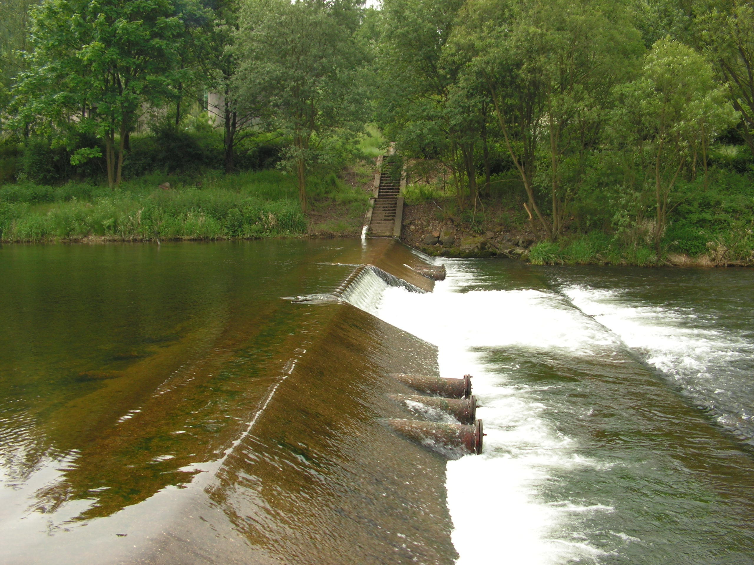 Měrný práh pod VD Želivka - Švihov, jež je součástí tohoto díla, při průtoku 2,1 m³/s.